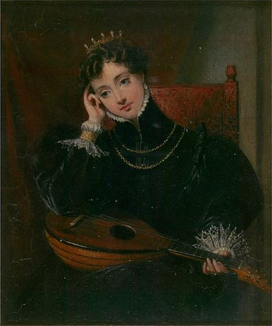 Portrait d'Amy Robsart, peint par Charles Robert Leslie (1794-1859), vers 1833